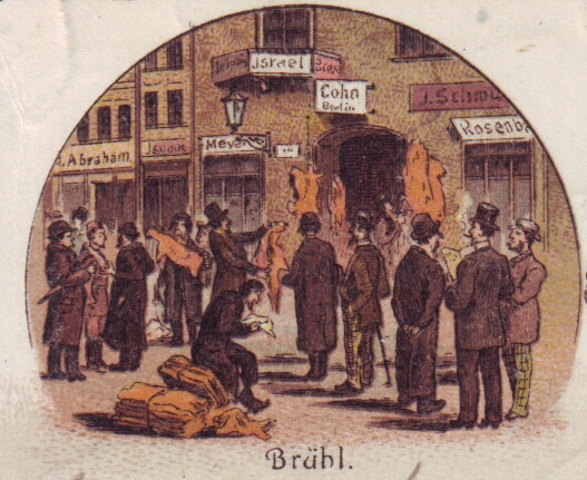 Ausschnitt der Postkarte Gruss von der Leipziger Messe. Die Petersstrasse während der Messe. Brühl"" Poststempel Leipzig 10. März 1909 und Coburg 11. März 2009; An Franz Silbermann, Coburg, Taubald's Institut In einem Reiseführer von 1930 wird der Brühl als eine der merkwürdigsten Geschäftsstraßen einer Großstadt beschrieben: „Ein Pelzgeschäft liegt neben und über dem anderen, Lastauto nach Lastauto werden mit Pelzen beladen. Am sonderbarsten aber sind die Sitten …“, eine davon war das Auf dem Brühl stehen. Gründe dafür gab es viele: Geschäftsabschlüsse, Akquisition, Informationsaustausch oder einfach nur das Pflegen von sozialen Kontakten. Nicht nur mindestens ein Vertreter jeder Leipziger Rauchwarenhandlung fand sich täglich hier ein, auch Bevollmächtigte der Zurichtereien und Färbereien, Kürschnereien und der der Pelzkonfektion kamen um sich auf dem Laufenden zu halten.